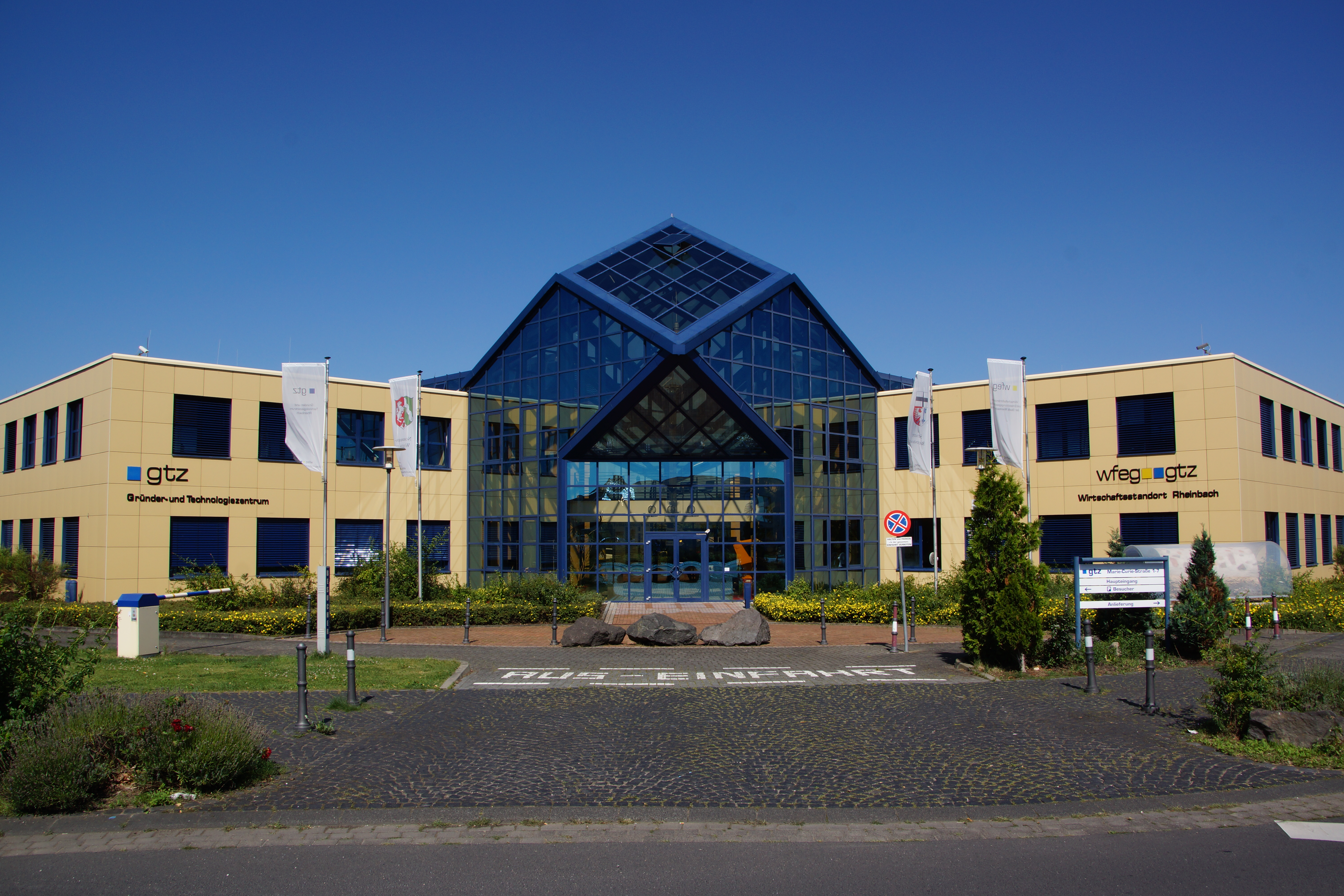 Gründer- und Technologiezentrum Rheinbach